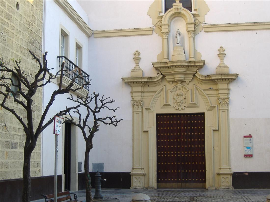 Portada principal de la iglesia del antiguo convento de San Francisco de Cádiz.